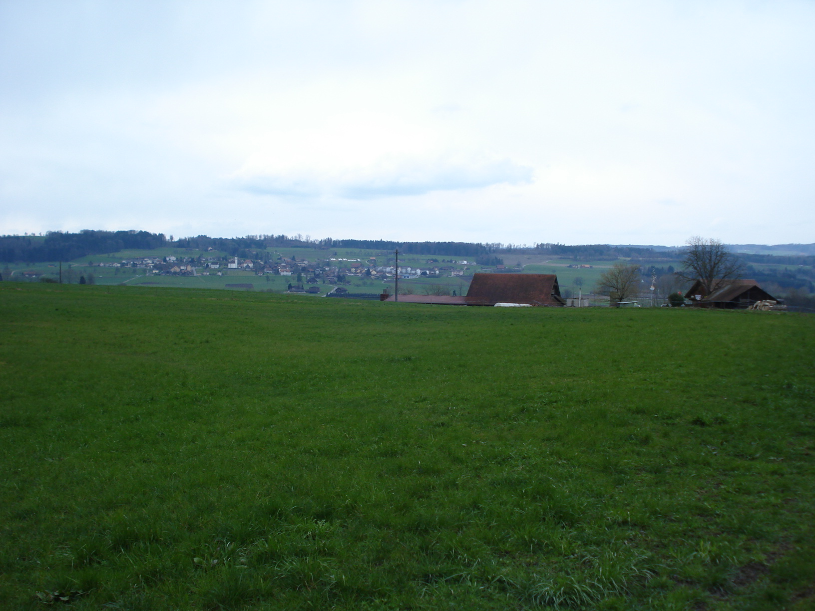 Blick von Berchtwil auf Dietwil